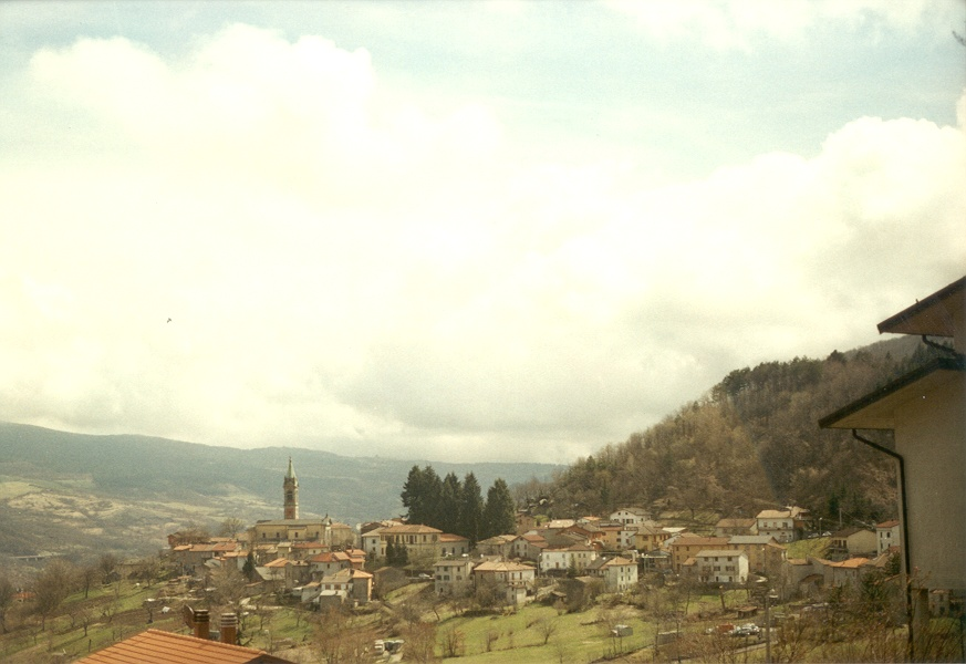 Baragazza, Castiglione dei Pepoli (BO) - panorama del paese